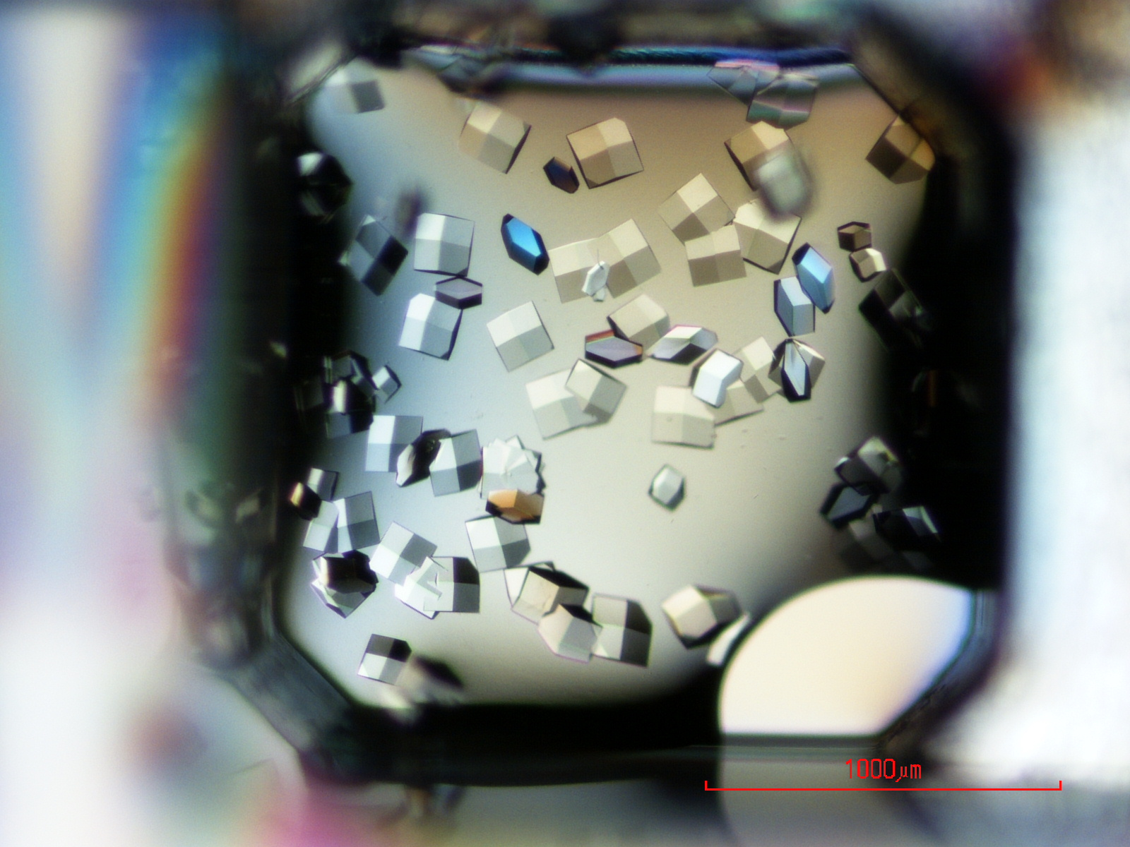 Lysozymkristalle nach zweistündiger Ruhezeit. pH-Wert auf 3,5 eingestellt mit 1 molarer Natriumcitrat-Lösung. Salzkonzentration (Natriumchlorid) 2,1 M. 2µl Enzymlösung (50 mg Lysozym je ml dest. Wasser) gemischt mit 1 µl Reservoir-Lösung. Sitting-Drop Methode.